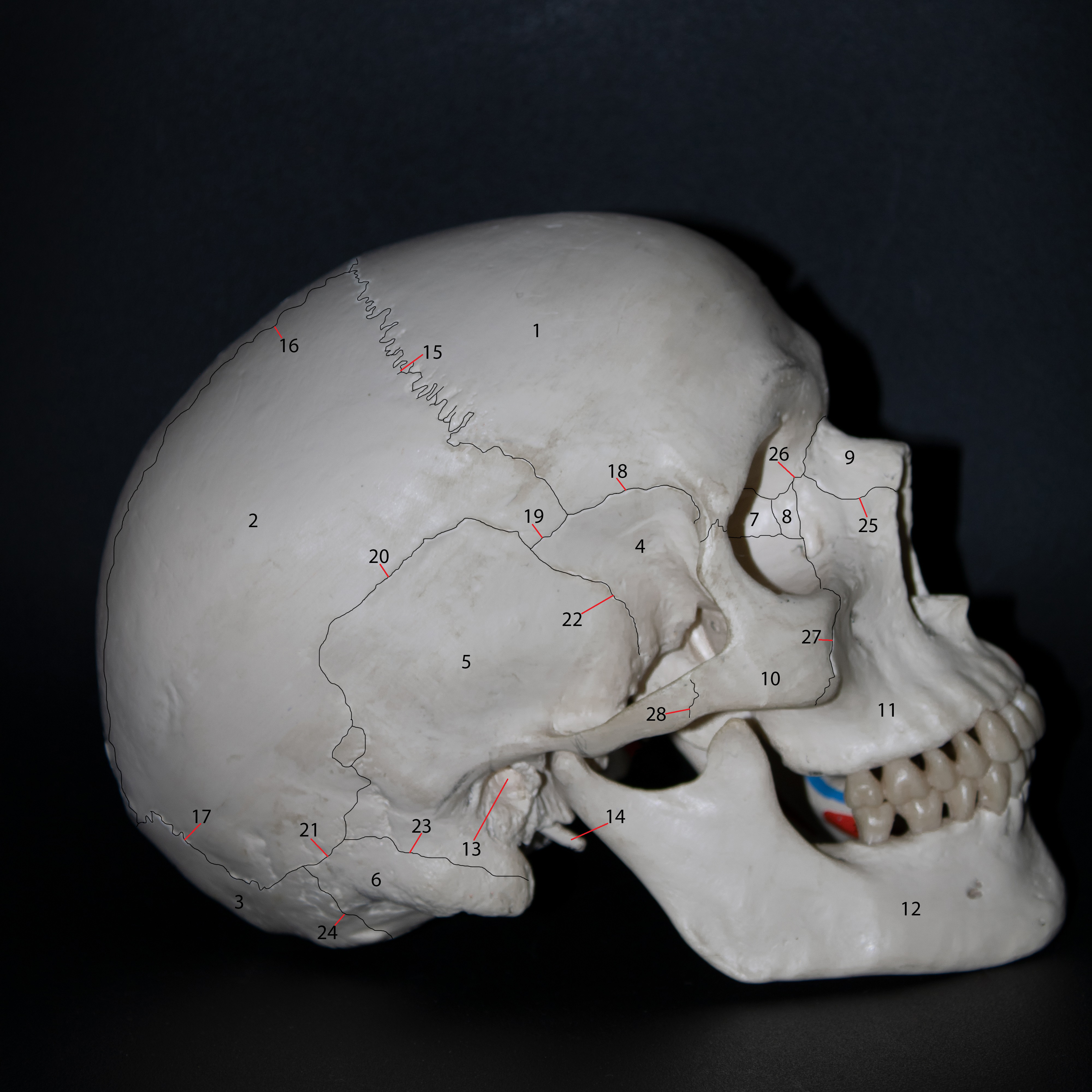 Περιοχές κρανίου αριθμημένες με τονισμένες τις κρανιακές ραφές